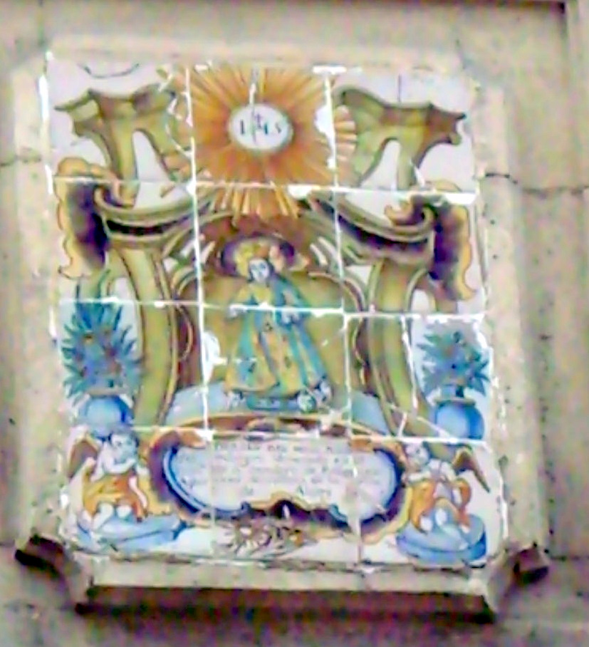 Imatge del Jesuset del Miracle. Segle XVIII.